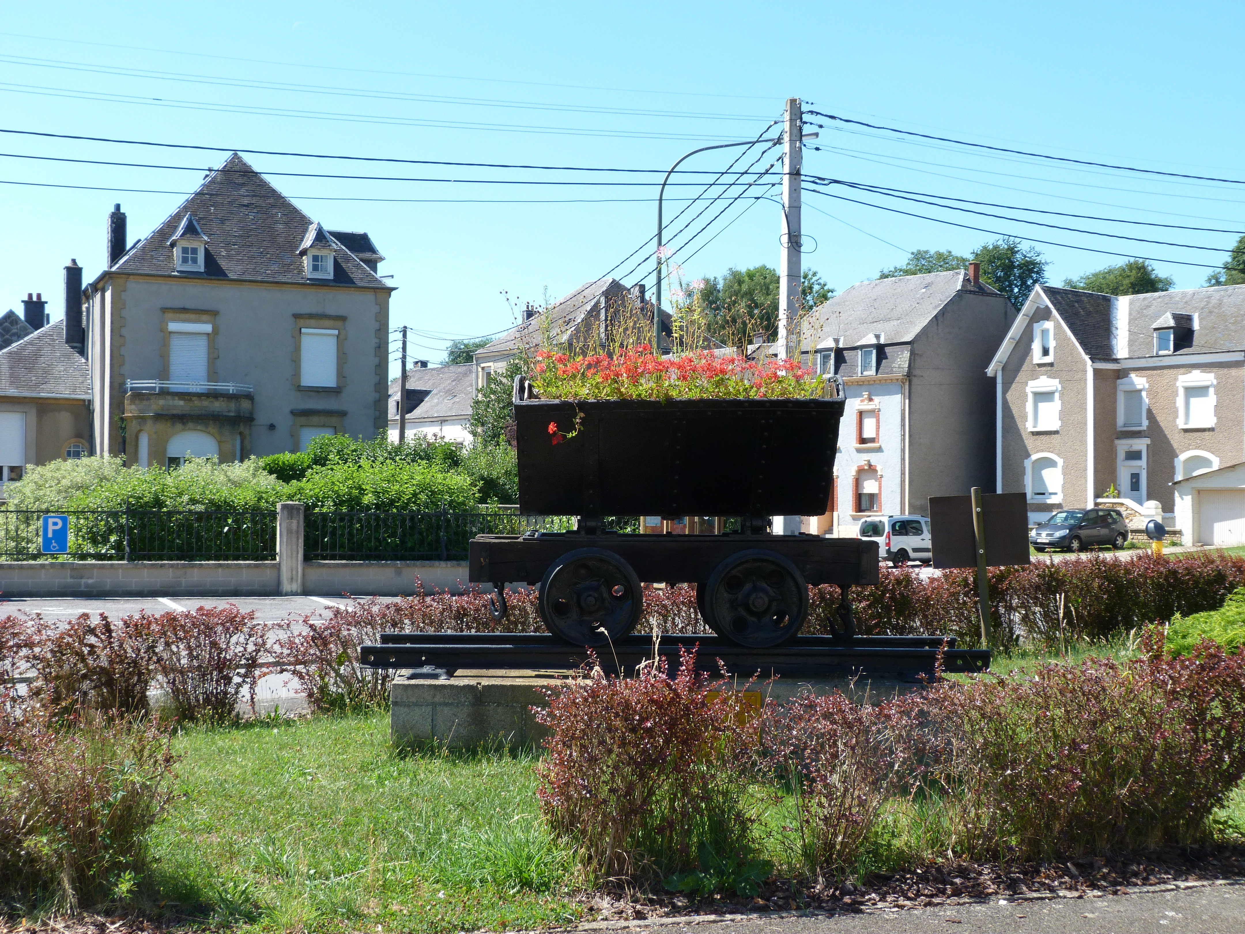 Un monument souvenir sur la place de Musson, il s'agit d'un ancien charriot tranportant le minerai depuis les mines d'Halanzy et de Musson. (photo prise en août 2013)